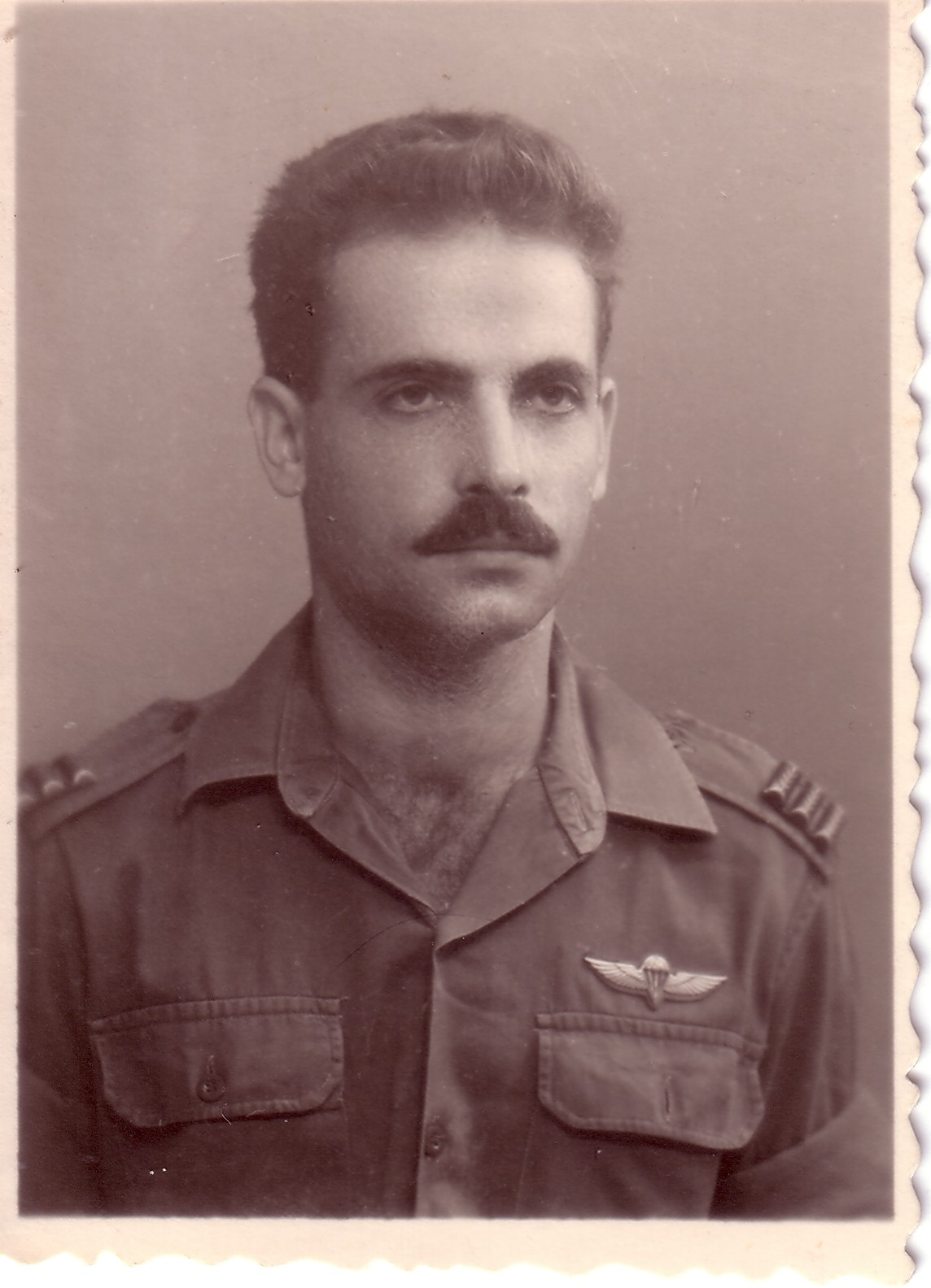 אלי אליעזרי בעת שירותו הצבאי